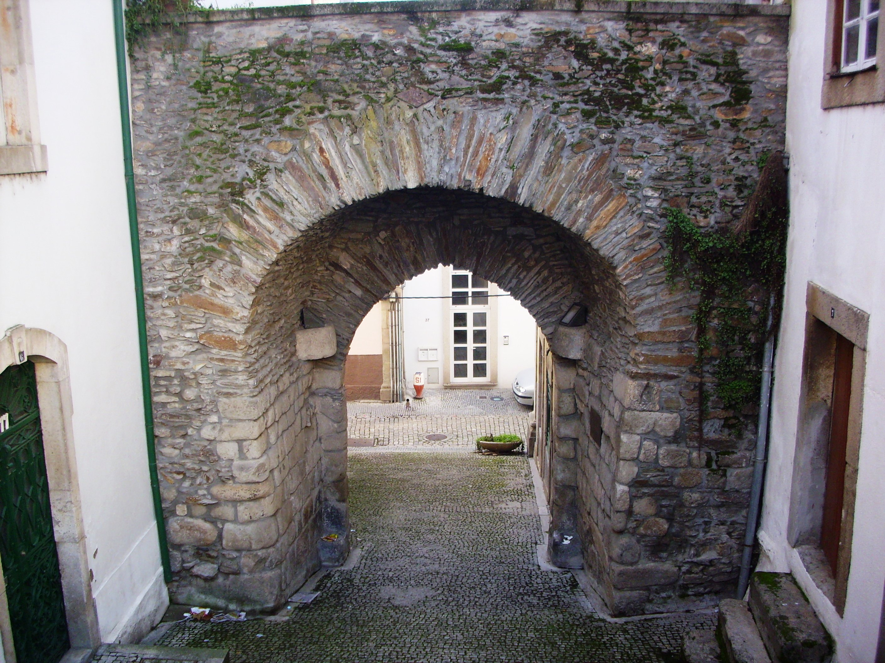 Porta de Santo António (interior), único remanescente da cerca medieval da vila de Mirandela.